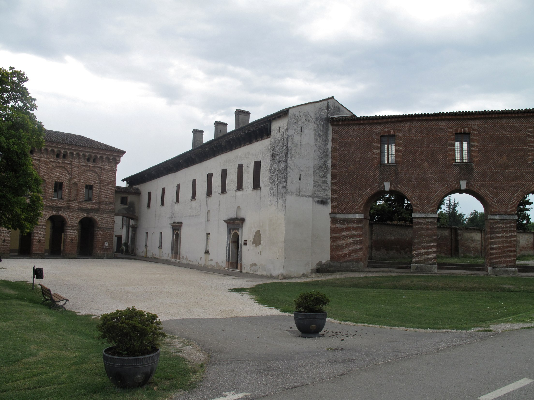 visite juillet 2010